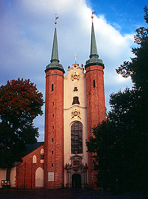 Kaszëbsczi: Katédra w Gduńskù-Òlëwie, môl pòchòwaniô panowników Pòrénkòwi Pòmòrsczi